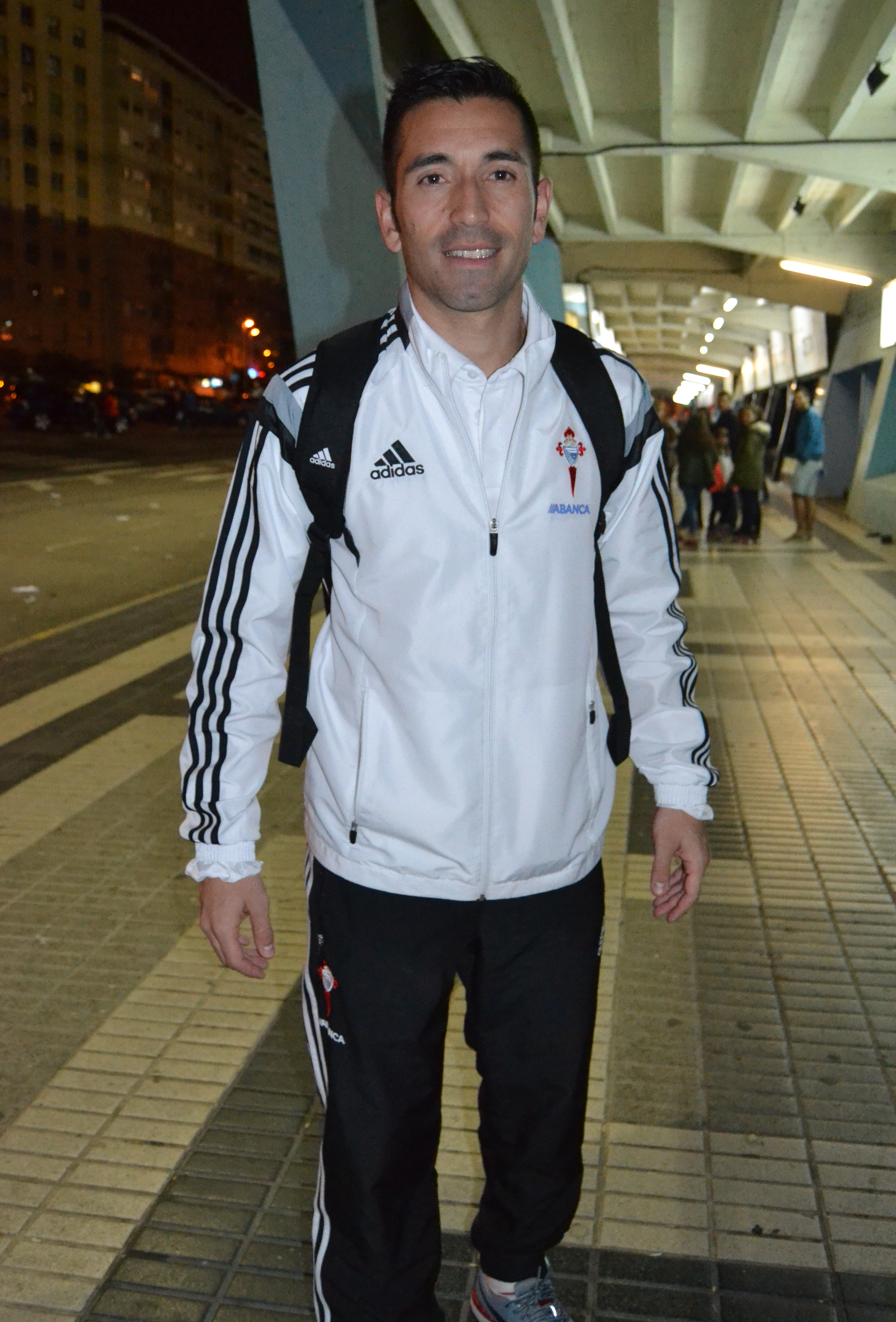 O futbolista Charles Dias